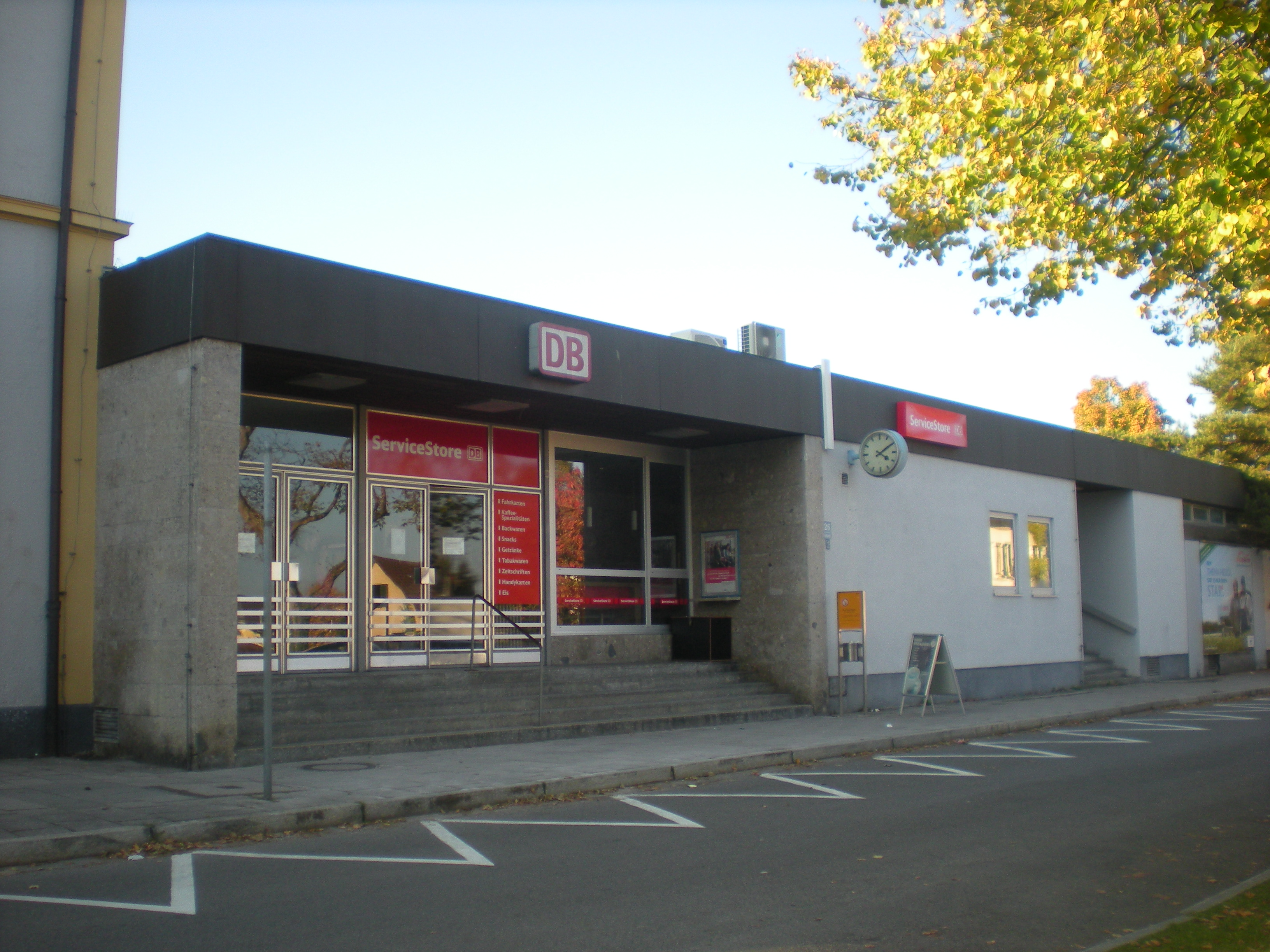 neues Bahnhofsgebäude des Bahnhofs Tutzing